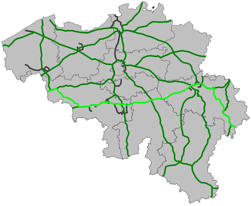 Traject Europese weg 42 door België